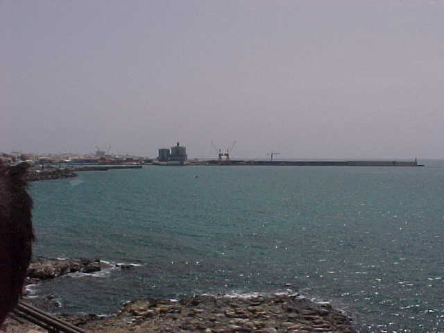 Imagen del espigón del puerto de Puerto del Rosario, Fuerteventura